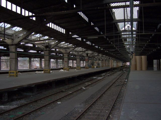 Güterbahnhof Nürnberg Süd